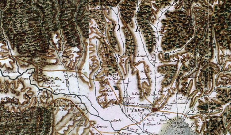 Carte de Puget-sur-Argens selon Cassini